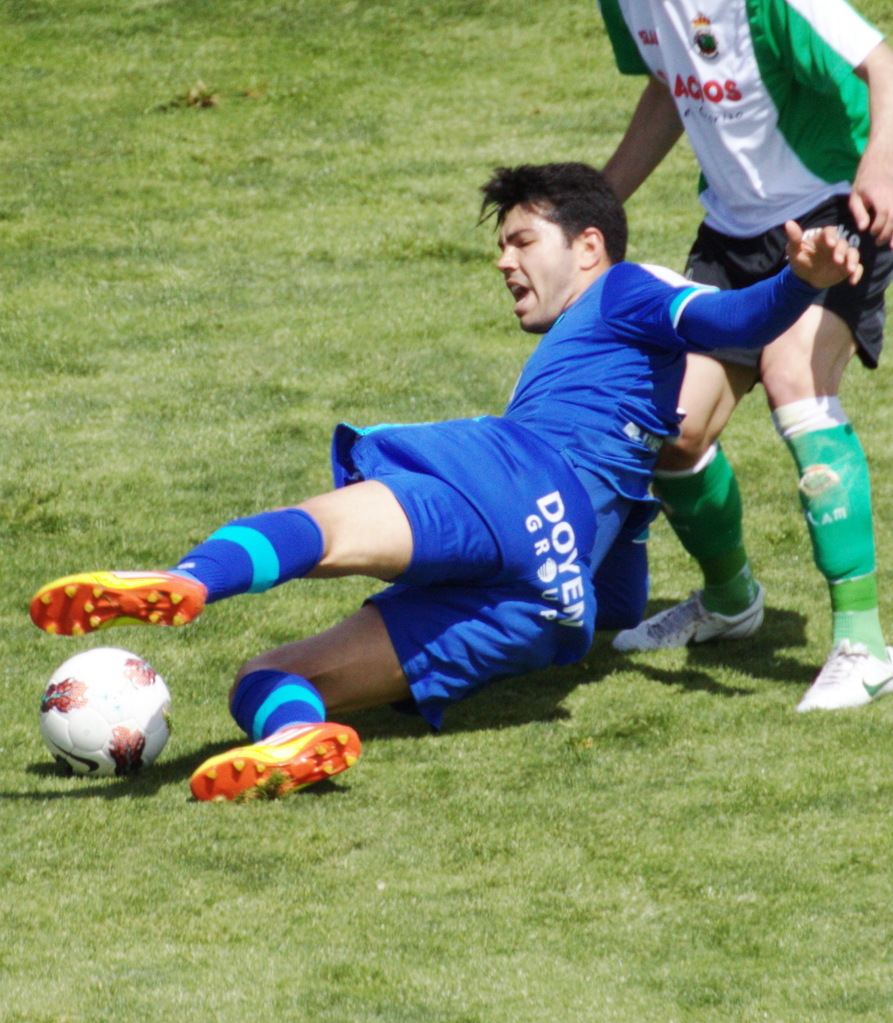 Nicolás Fedor, más conocido por su apodo Miku (Caracas, 19 de agosto de 1985), es un futbolista venezolano. Juega de delantero y su actual equipo es el Getafe CF.